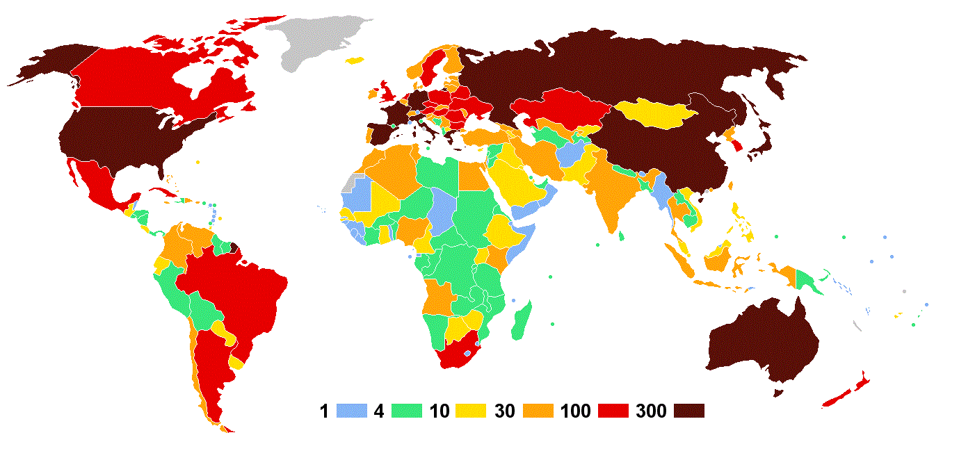 Olympische Sommerspiele 2004 Anzahl der Athleten